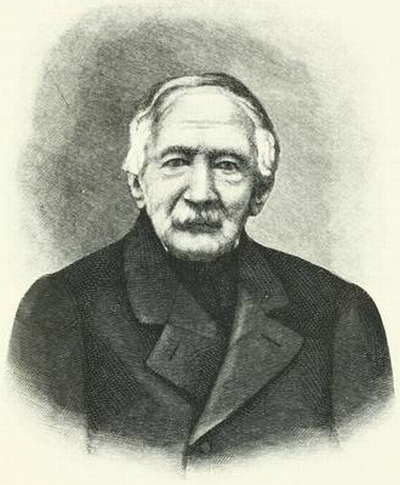 Оболенский, Евгений Петрович